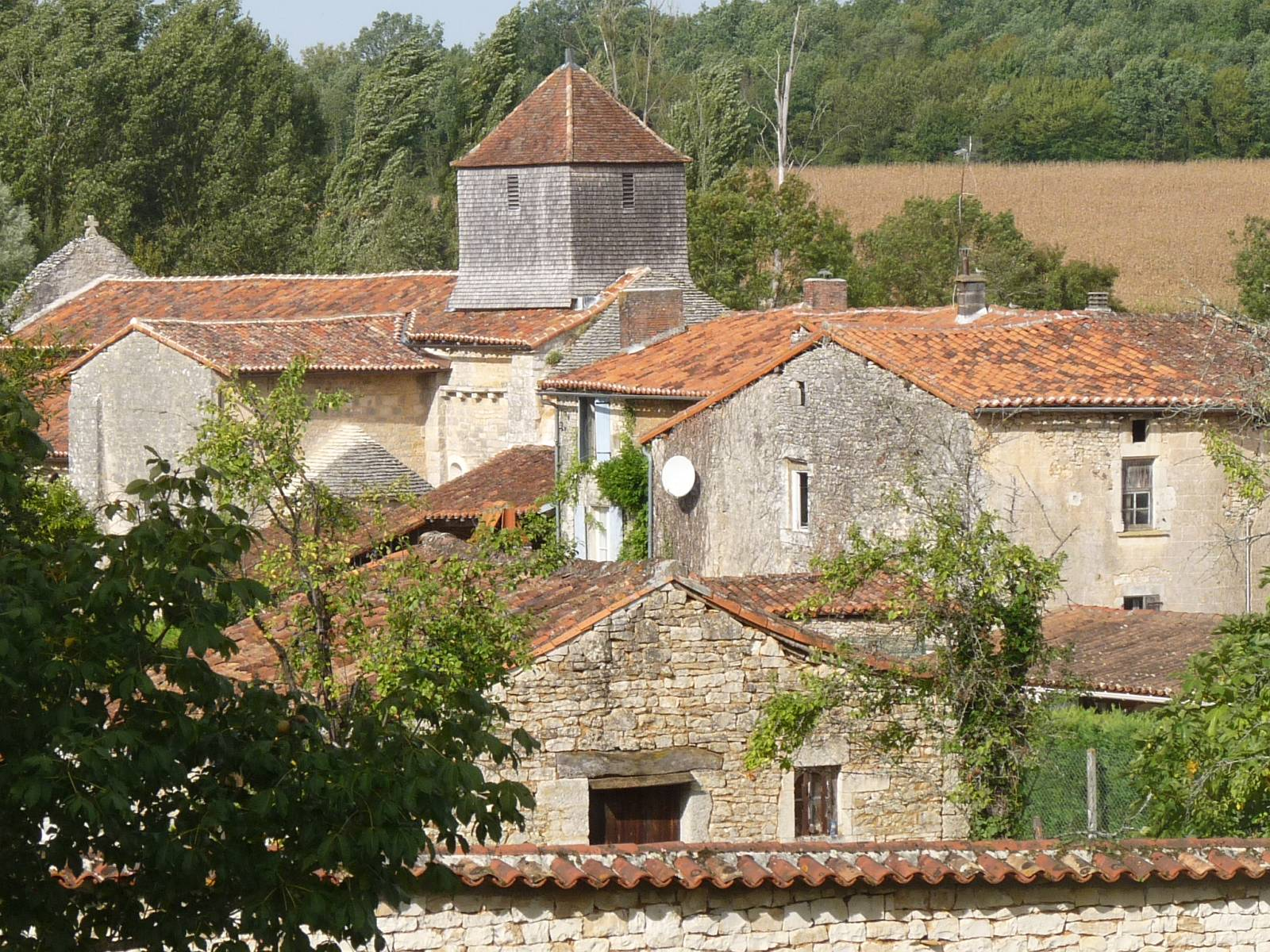 vue de Poursac (Charente, France) non loin de la mairie